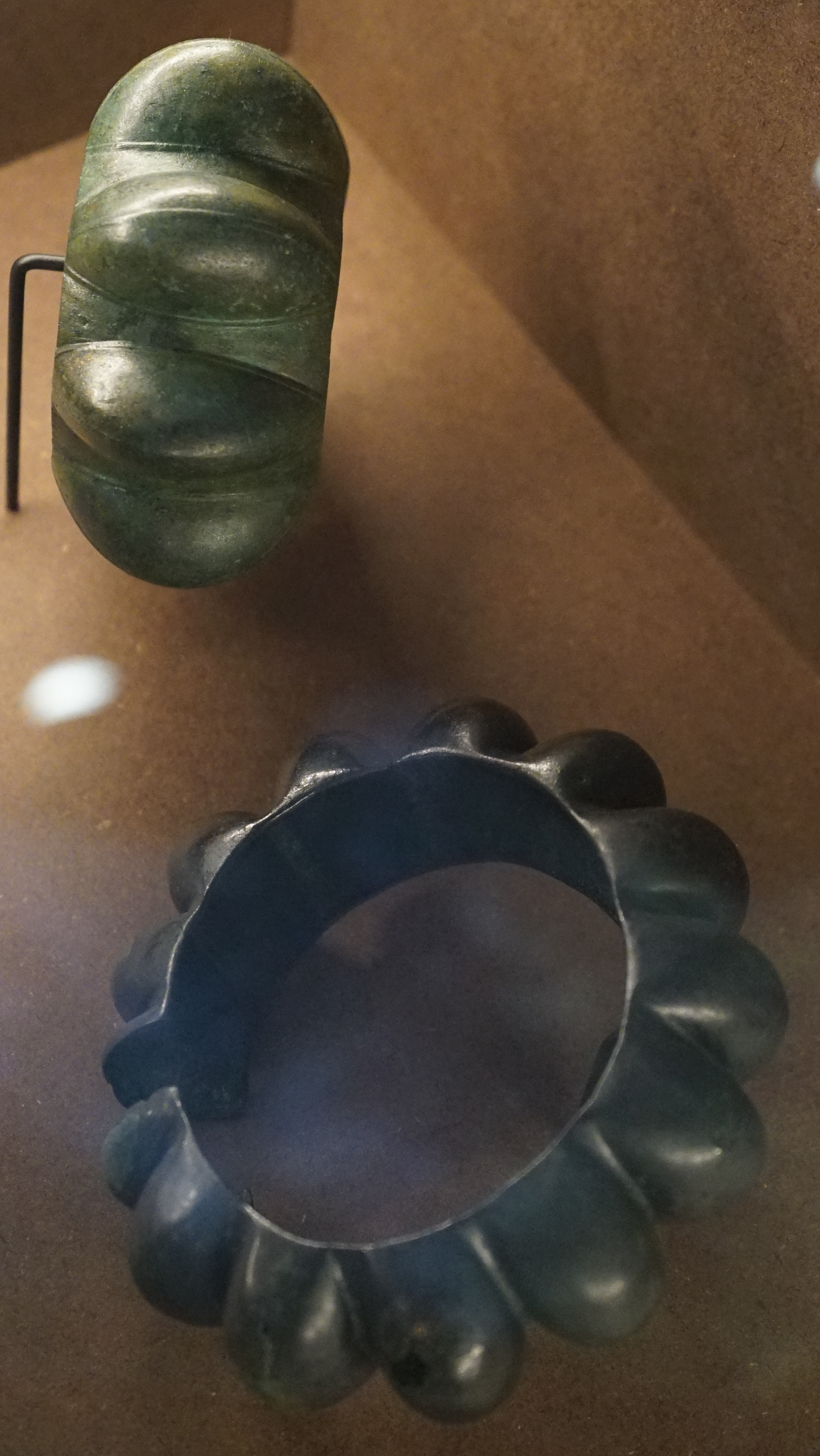 exposé à Troyes.